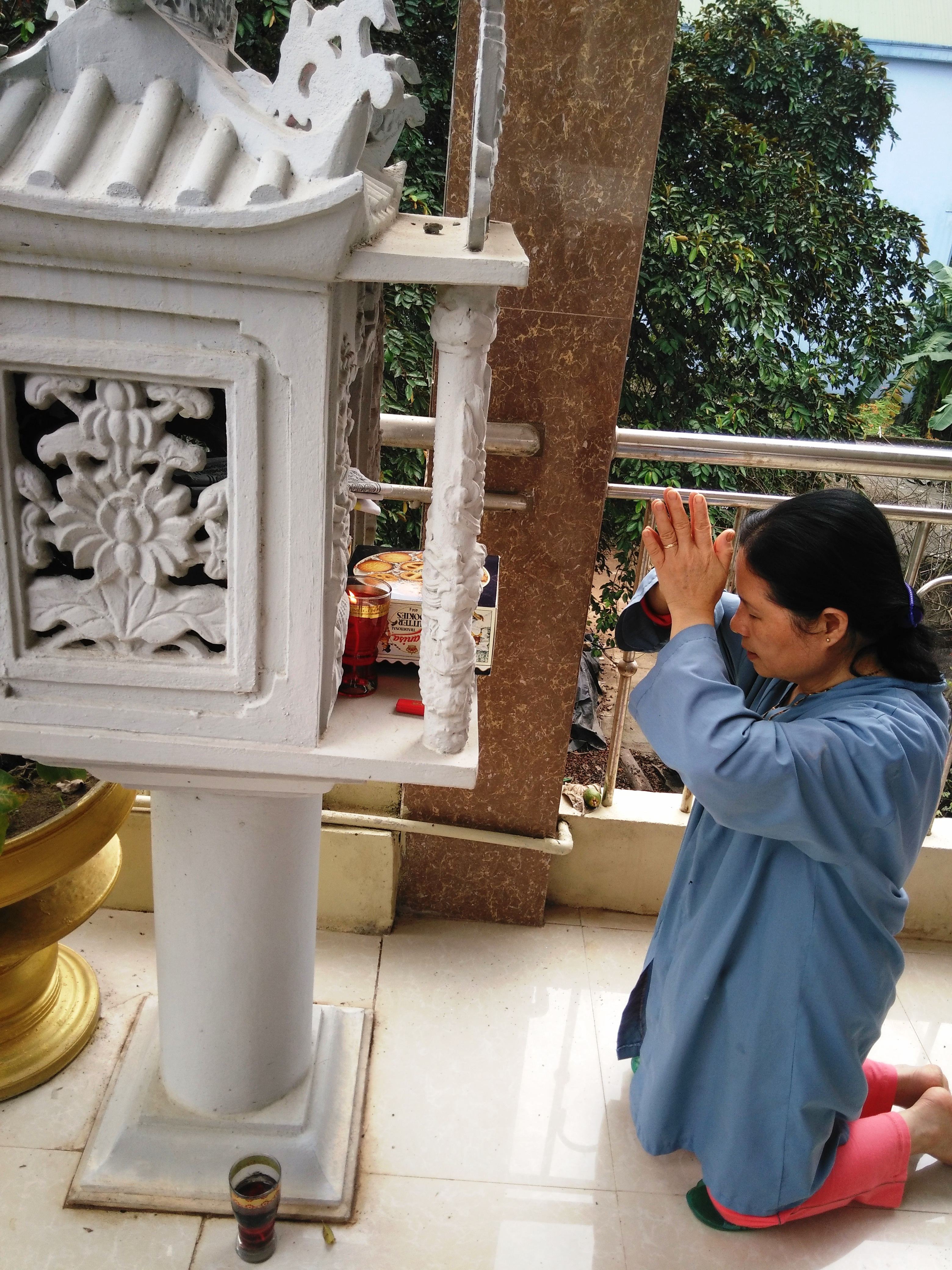 Hình tự chụp bằng máy ảnh cá nhân một phụ nữ (phái áo lam) đang cúng vái cầu khẩn